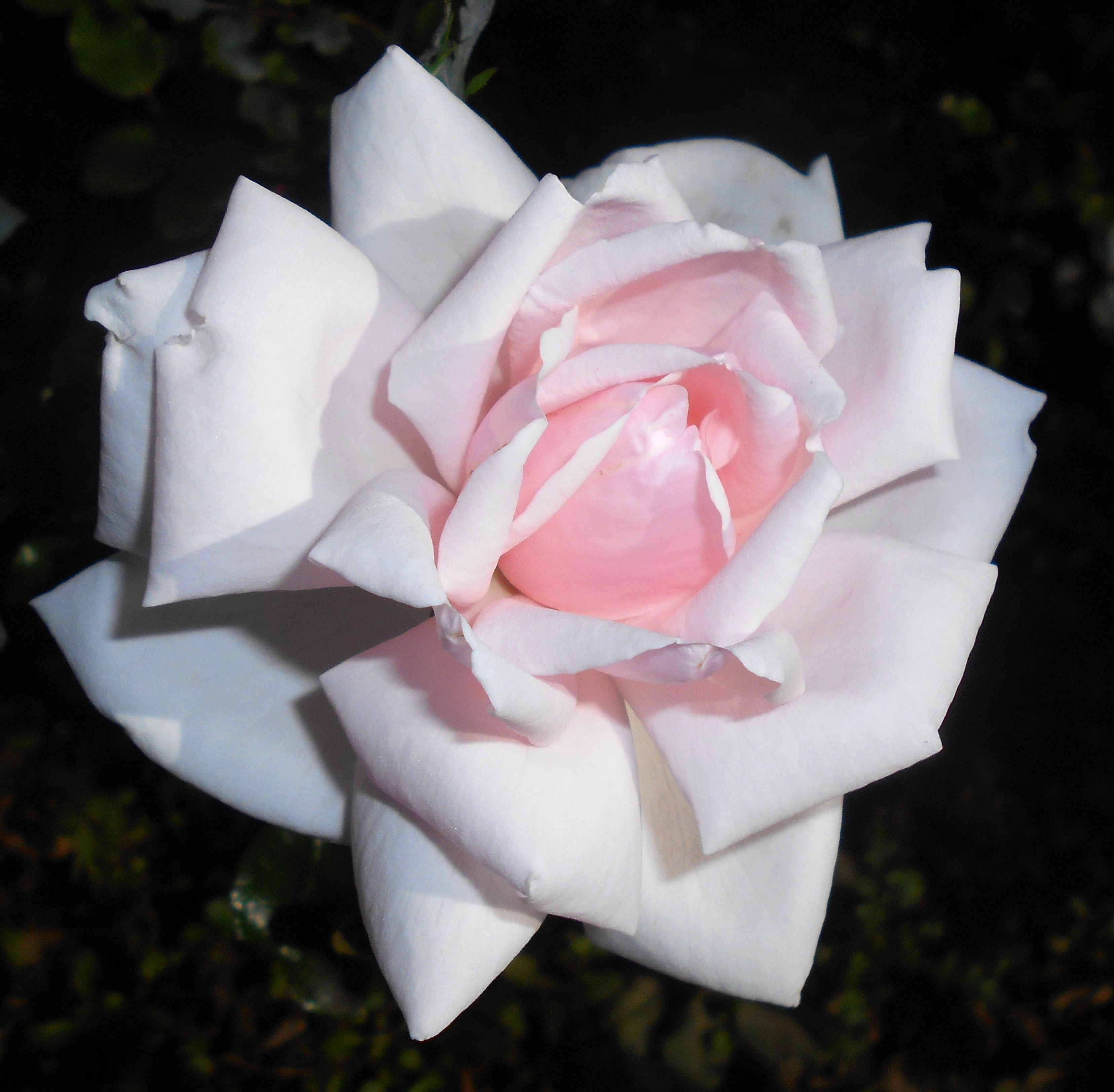 Róża ‘New Dawn‘ (Rosa ‘New Dawn‘), Ogród Botaniczny UMCS w Lublinie.